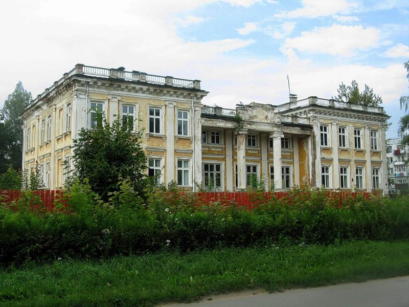 Беларуская (тарашкевіца): Шчучын